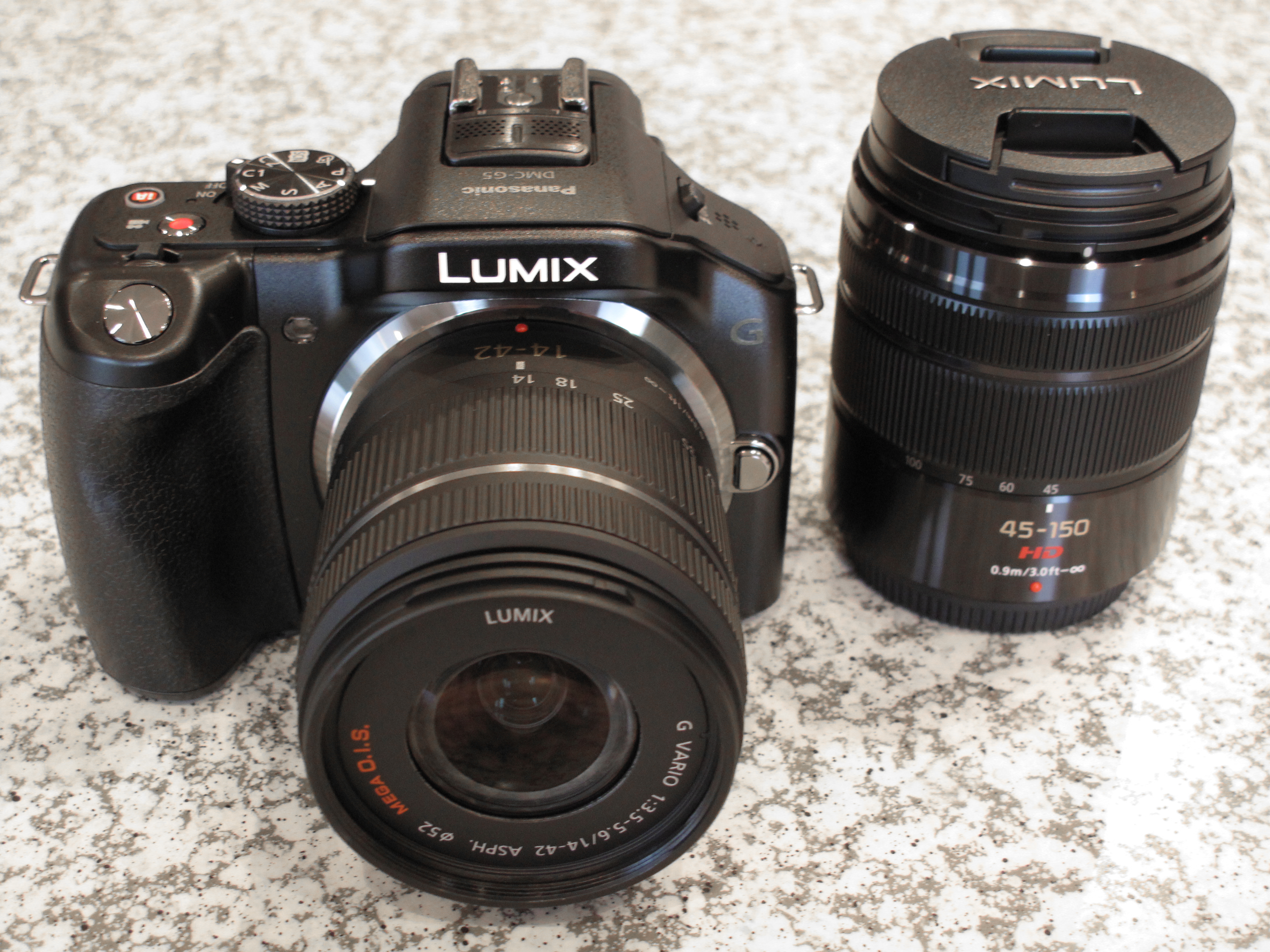 LUMIX G VARIO 14-42mm/F3.5-5.6 ASPH./MEGA O.I.S. LUMIX G VARIO 45-150mm/F4.0-5.6 ASPH./MEGA O.I.S. I got a new digital camera.